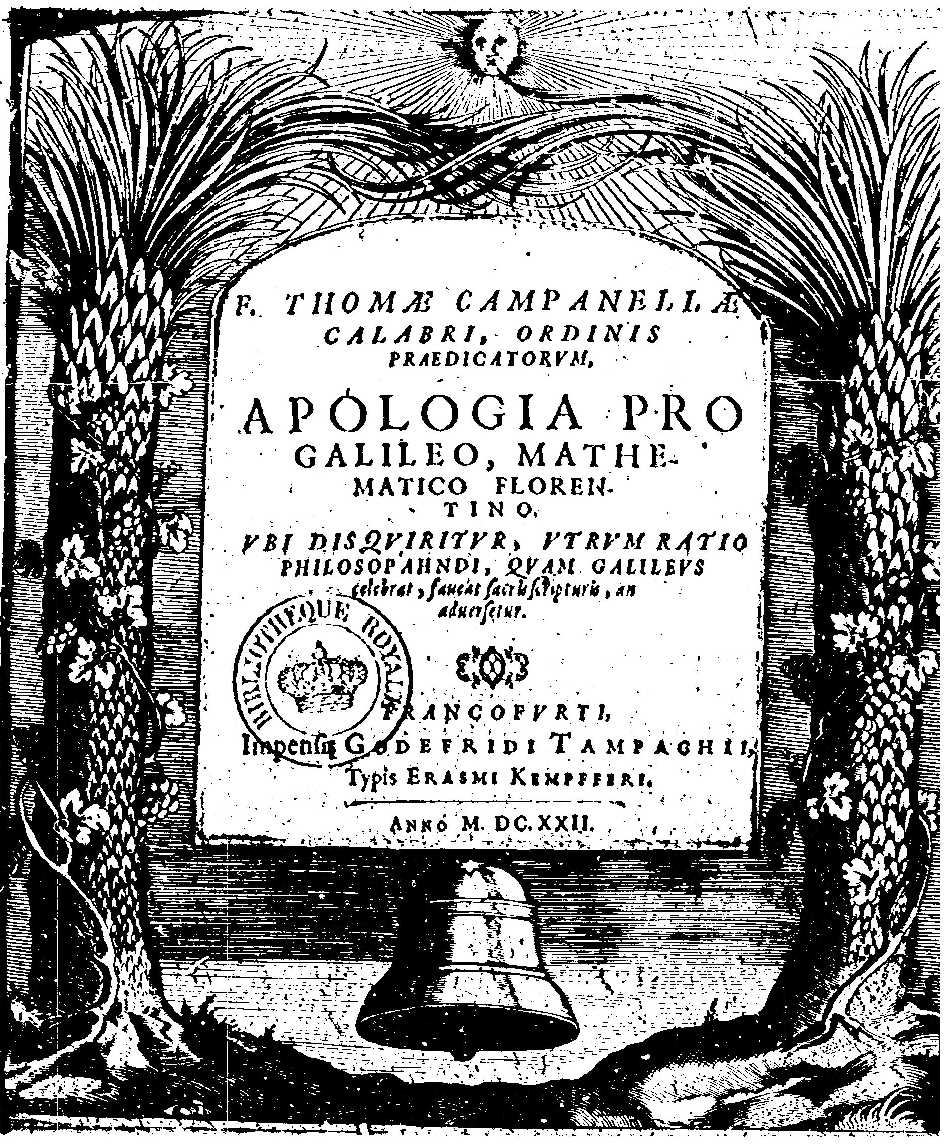 Apologia pro Galileo, di Tommaso Campanella, Francoforte 1622